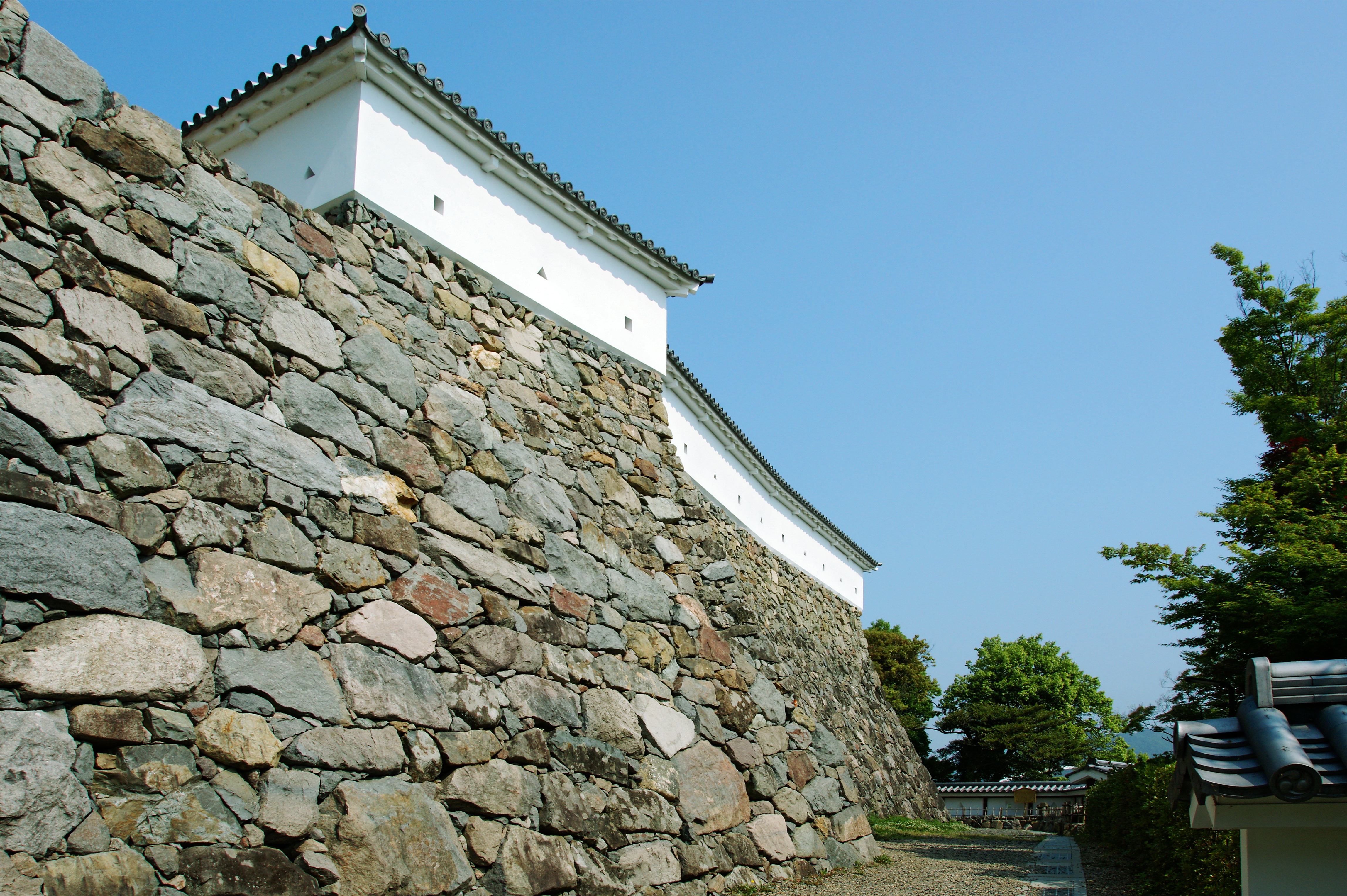 Fukuchiyama Castle in Fukuchiyama, Kyoto prefecture, Japan